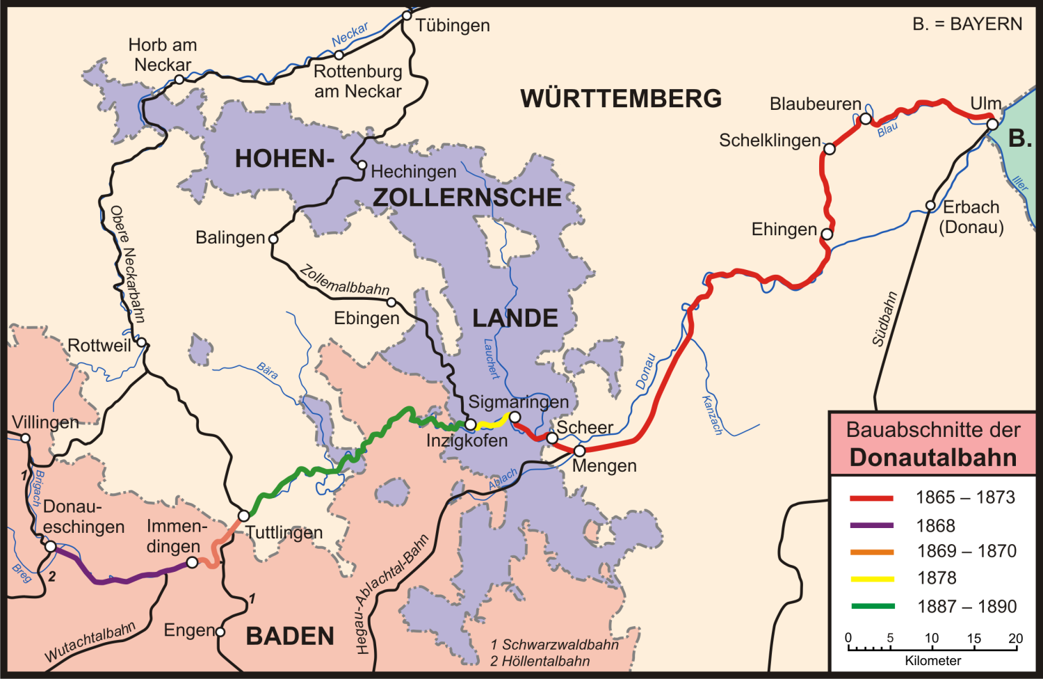 Bauabschnitte und Verlauf der Donautalbahn durch Baden, Württemberg und den Hohenzollernschen Landen